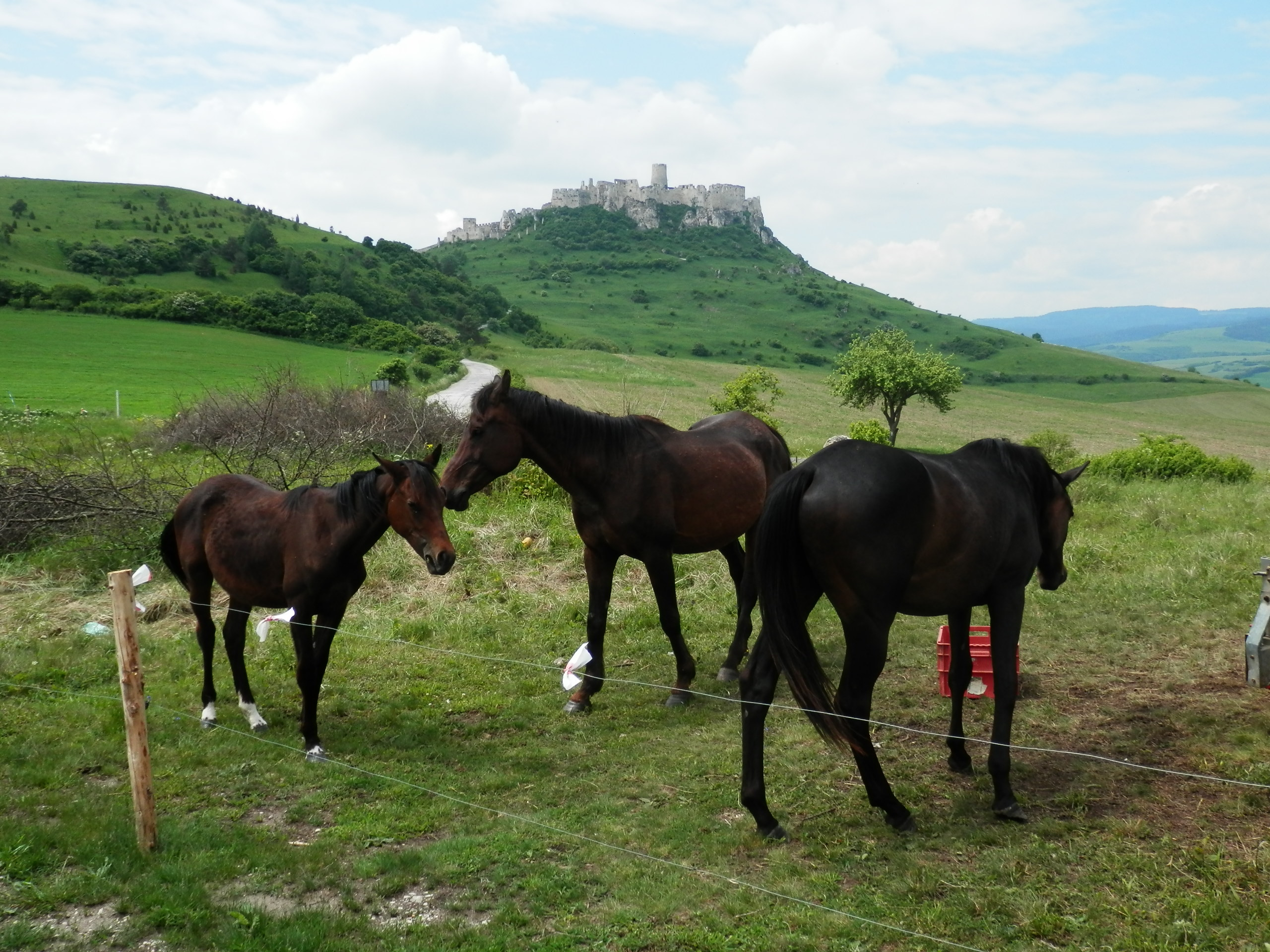 Kone vo výbehu pod Spišským hradom, kataster obce Žehra-Hodkovce, okres Spišská Nová Ves.